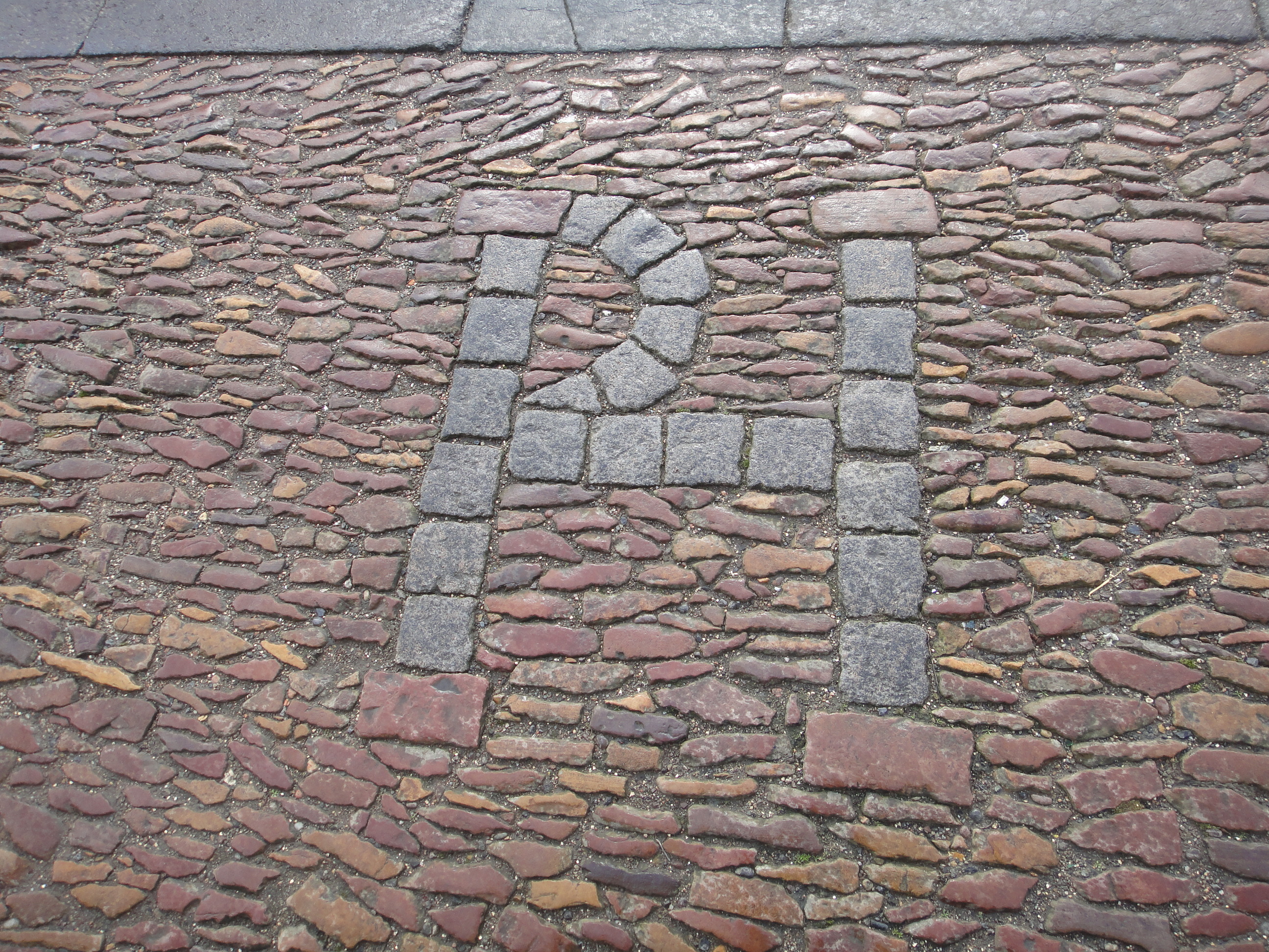 圣安德鲁斯大学被诅咒的鹅卵石